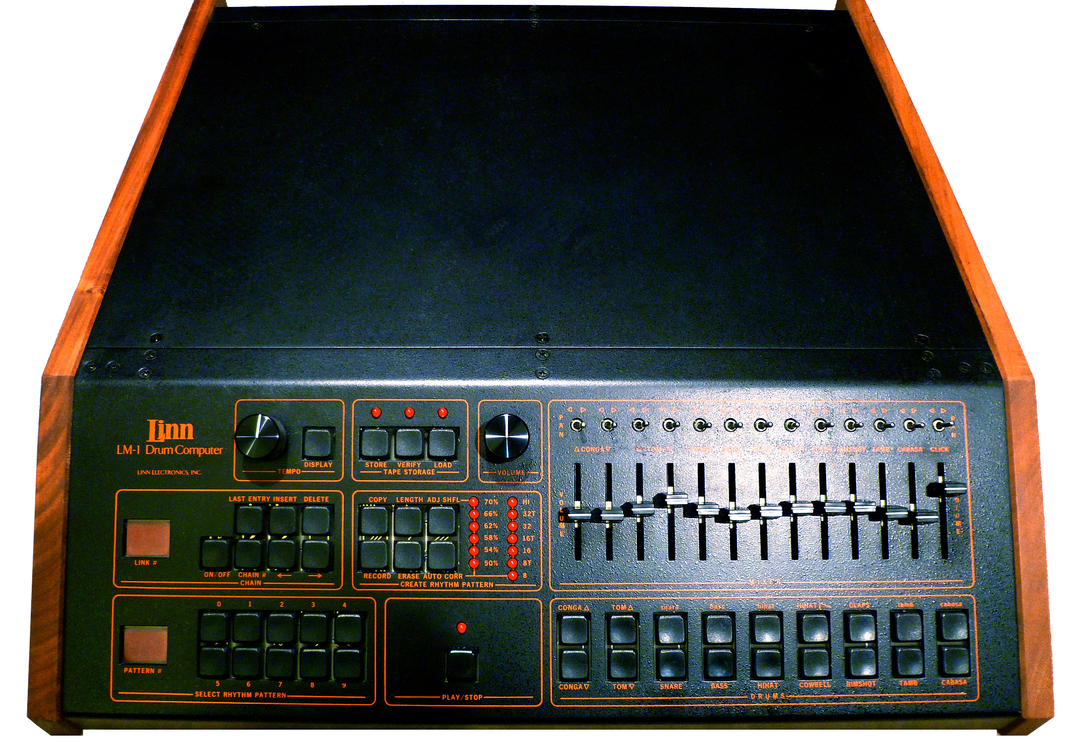 Linn LM-1 Drum Computer - digital drum machine